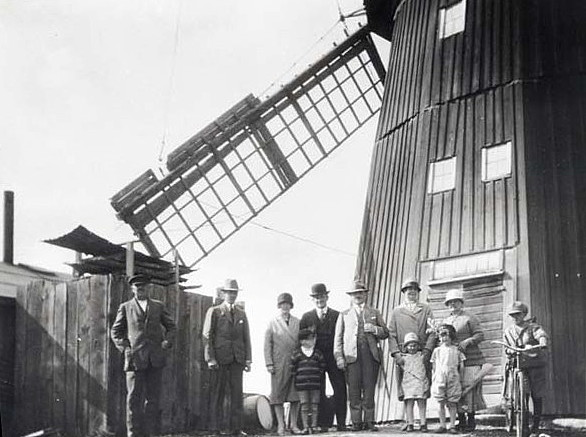 Bergby kvarn i Markim sommaren 1928. Karlssons i Bergby har Stockholmsfrämmande. Fr v står Hugo Karlsson, Arnemo, Maja Pettersson, pojken Georg Pettersson, Erik Pettersson, okänd, fru Pettersson, syskonen flicka och Gösta Karlsson som var sommarbarn i Hagalund, Julia Karlsson och på cykeln Hemrik Oldeskog född Karlsson.